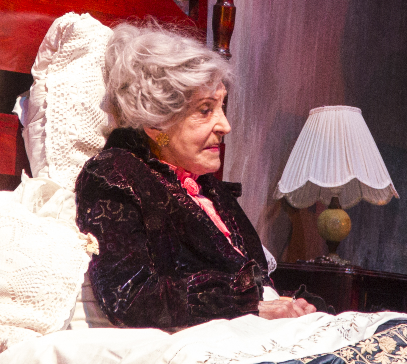 Coronacion en el GAM. @GAM 10.11.13 Nelly Meruane como Misia Elisa, Francisco Melo en el papel de su nieto, Andrés.